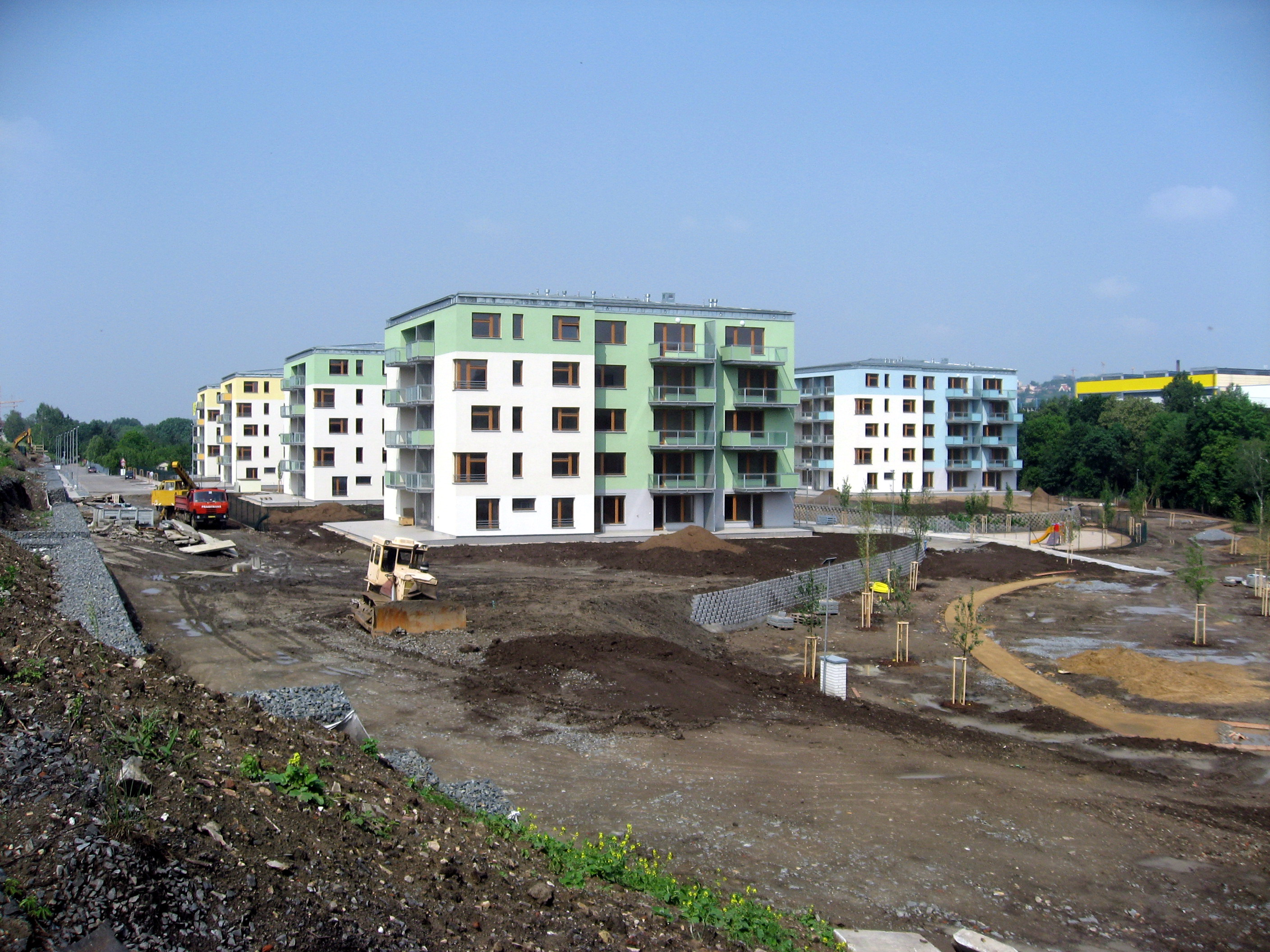 Nové domy na místě kolejí vlečky ČKD